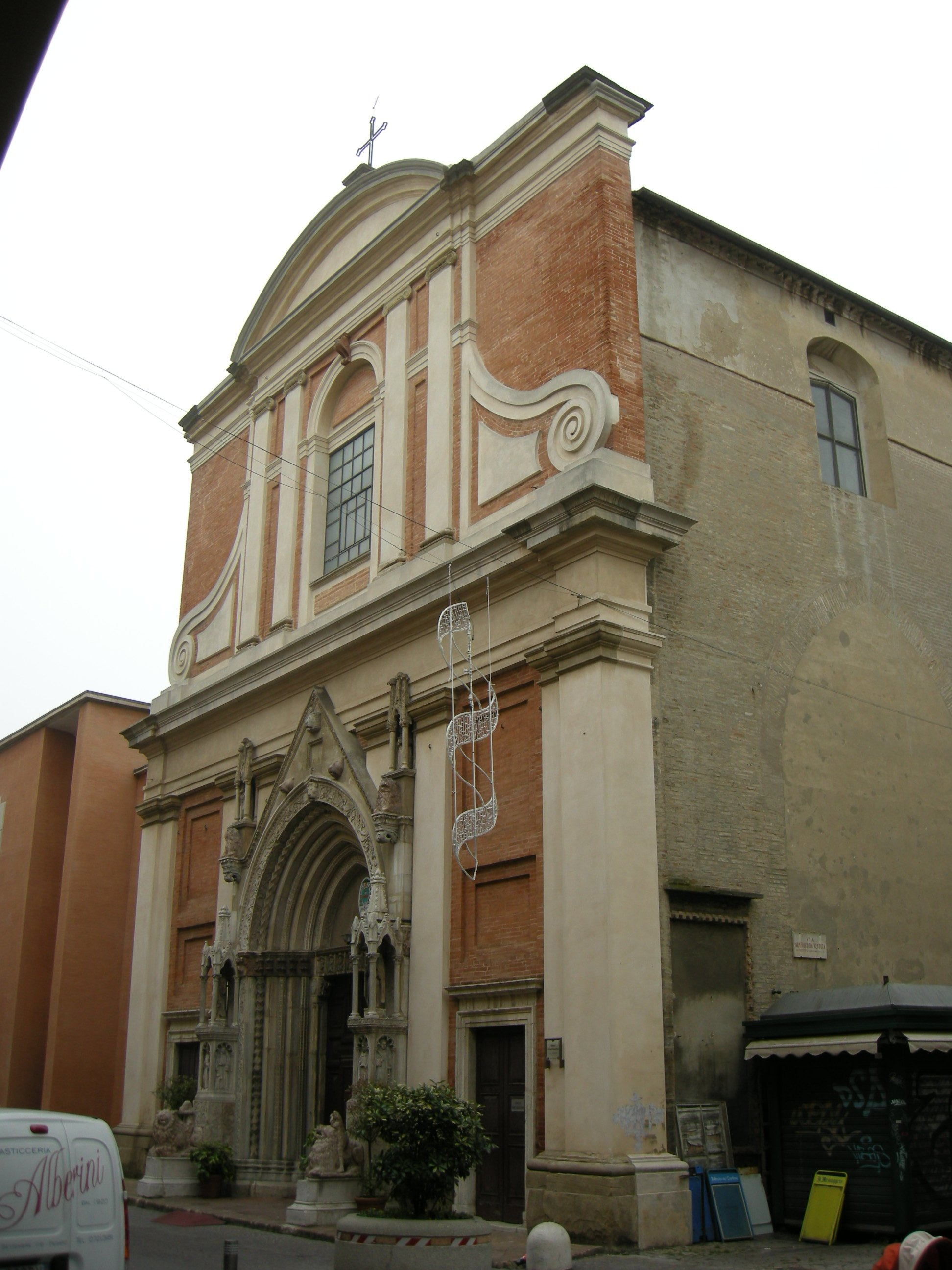 Pesaro, sant'agostino